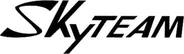 Vertriebslogo der chin. Sky Team Corporation